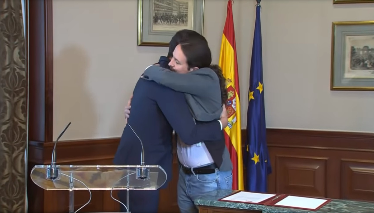 Declaración conjunta de Pablo Iglesias y Pedro Sánchez